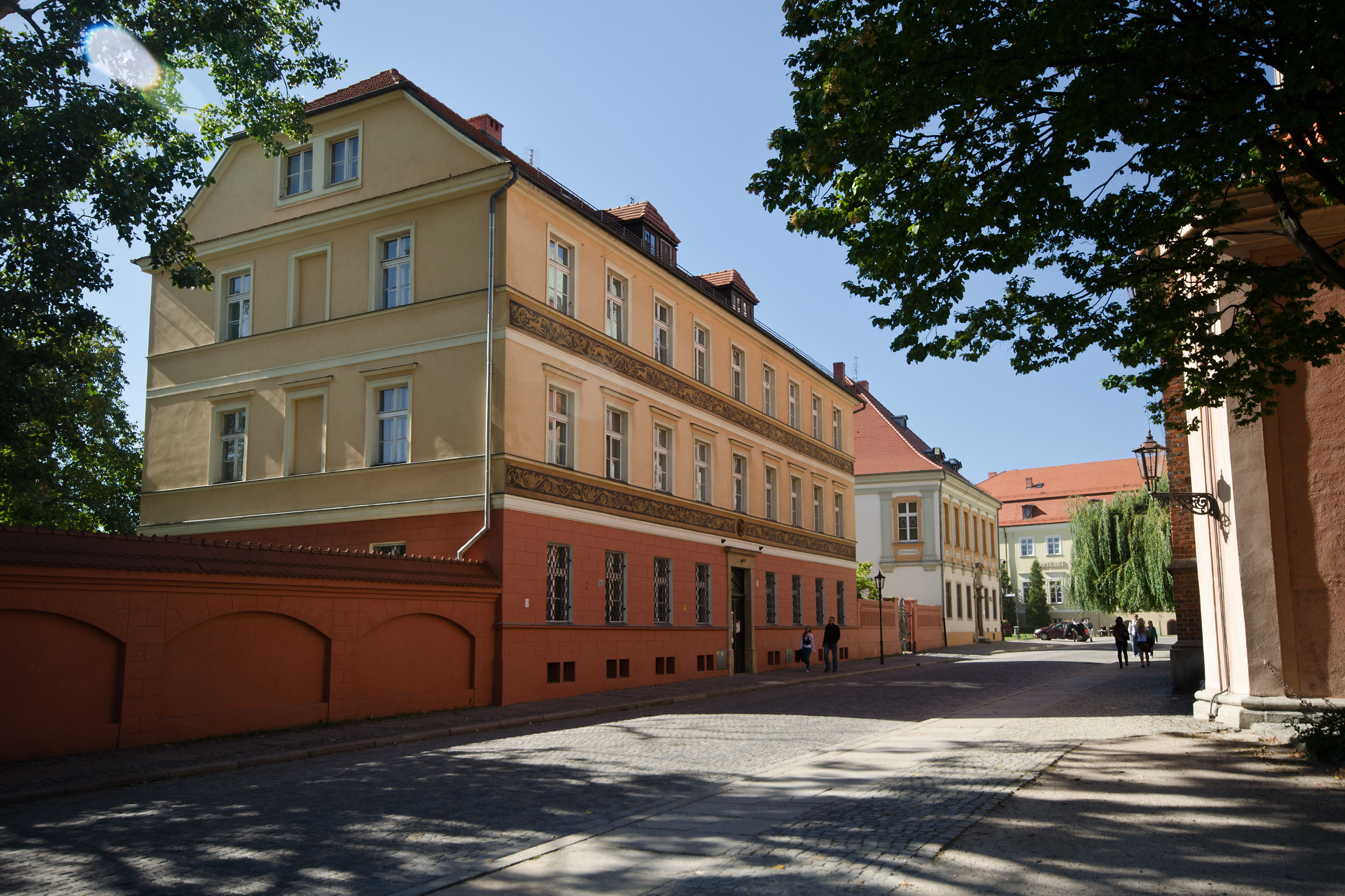 Kanonia pl. Katedralny 6, Miasto Wrocław - Śródmieście